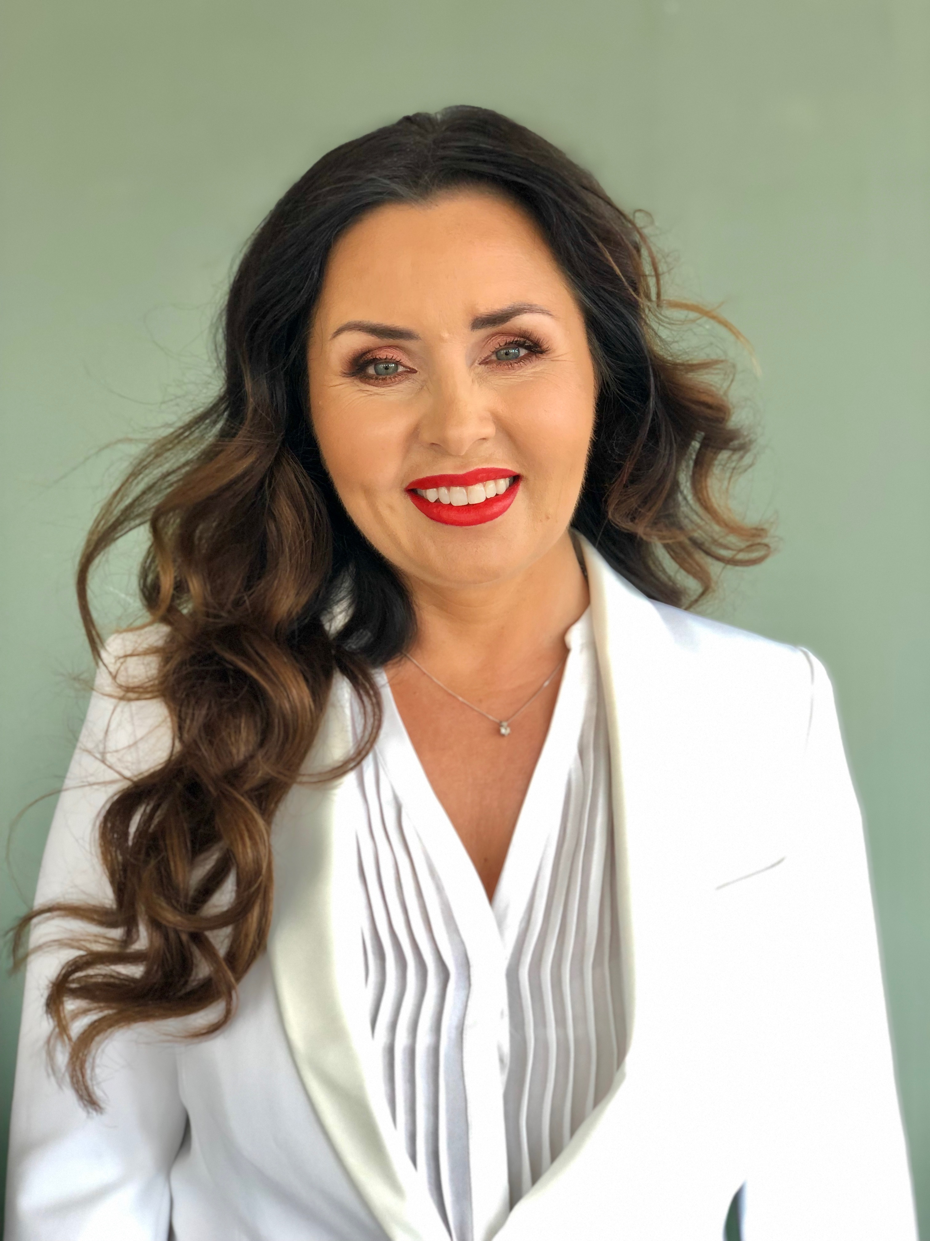 Christina Erikson, deckarförfattare